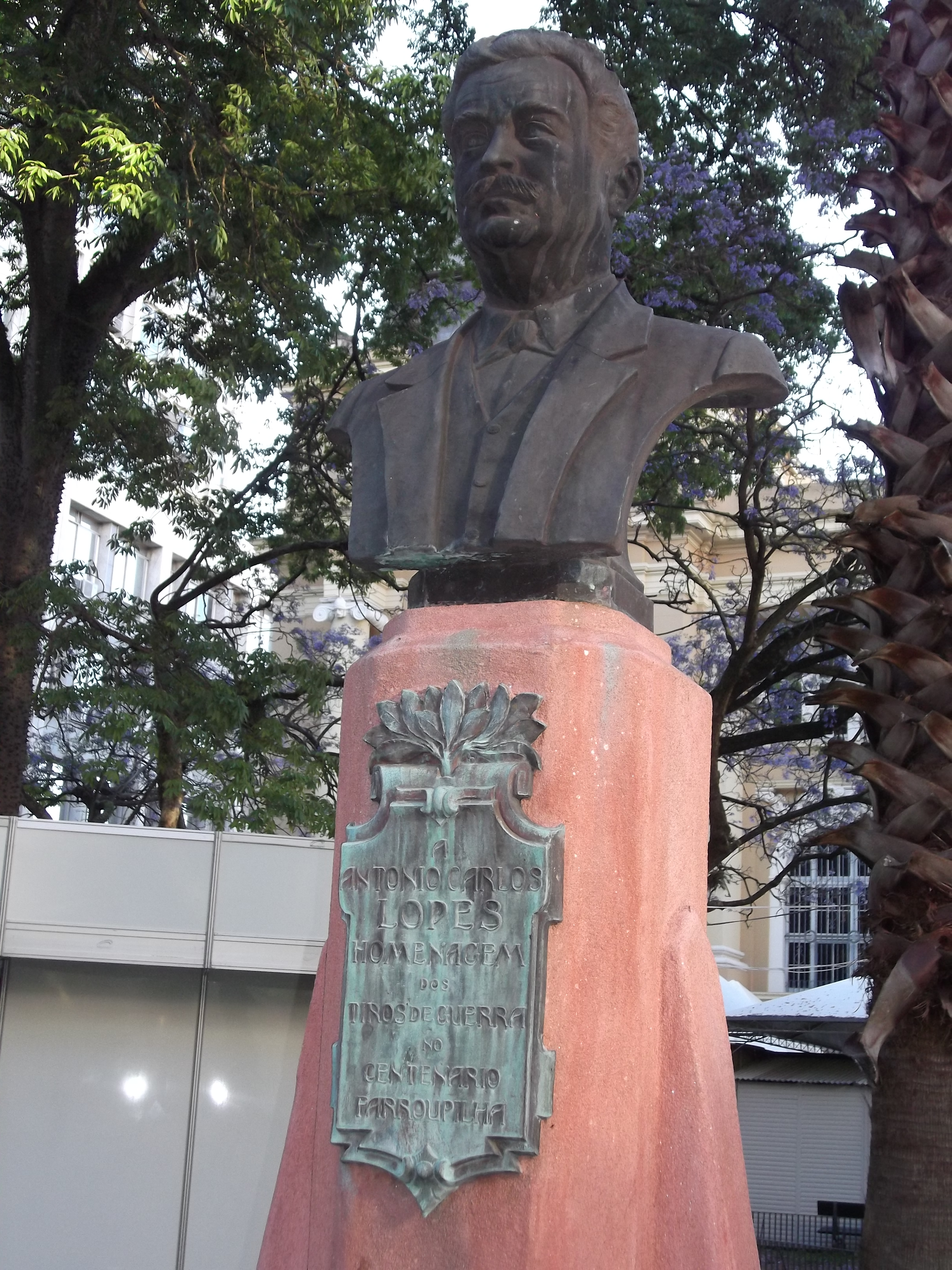 Busto de Antonio Carlos Lopes